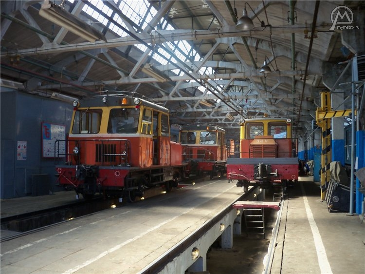 Мотовозы МК2/15 (слева) и ДМ (справа) в электродепо Сокол Московского метрополитена